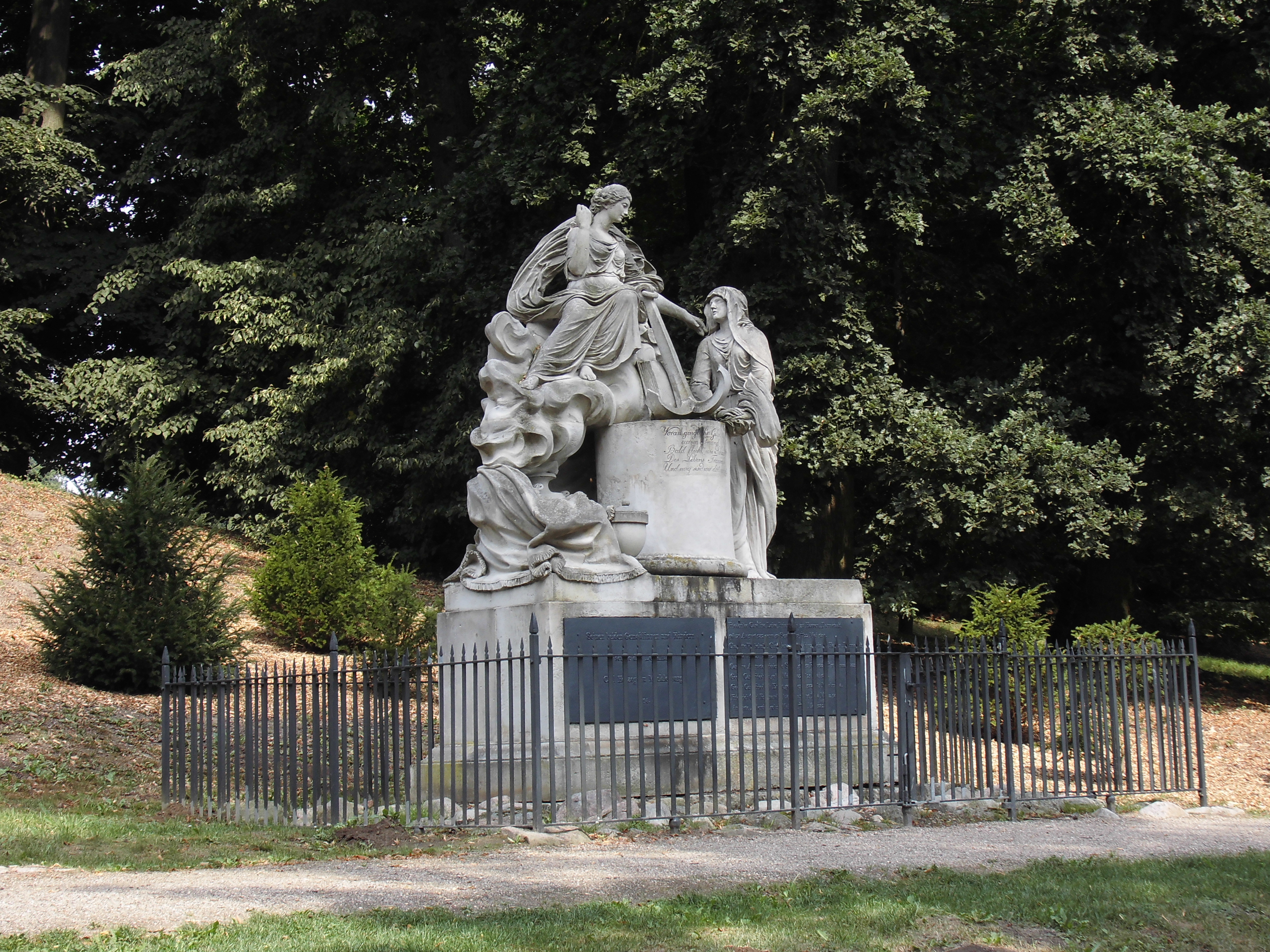 Hohenzieritz, Denkmal der Gemahlinnen und Kinder des Herzogs Karl von Mecklenburg-Strelitz mit Figurengruppe „Die Hoffnung tröstet die Trauer“, errichtet 1798, ausgeführt von Bildhauer Christian Philipp Wolff